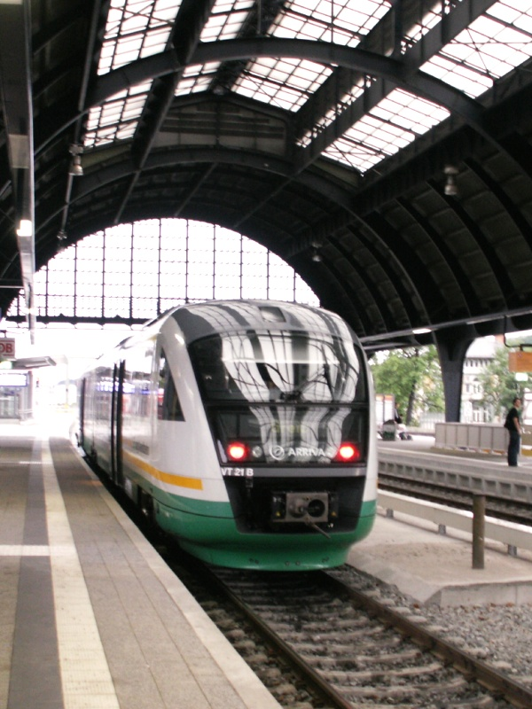 Gera Hbf